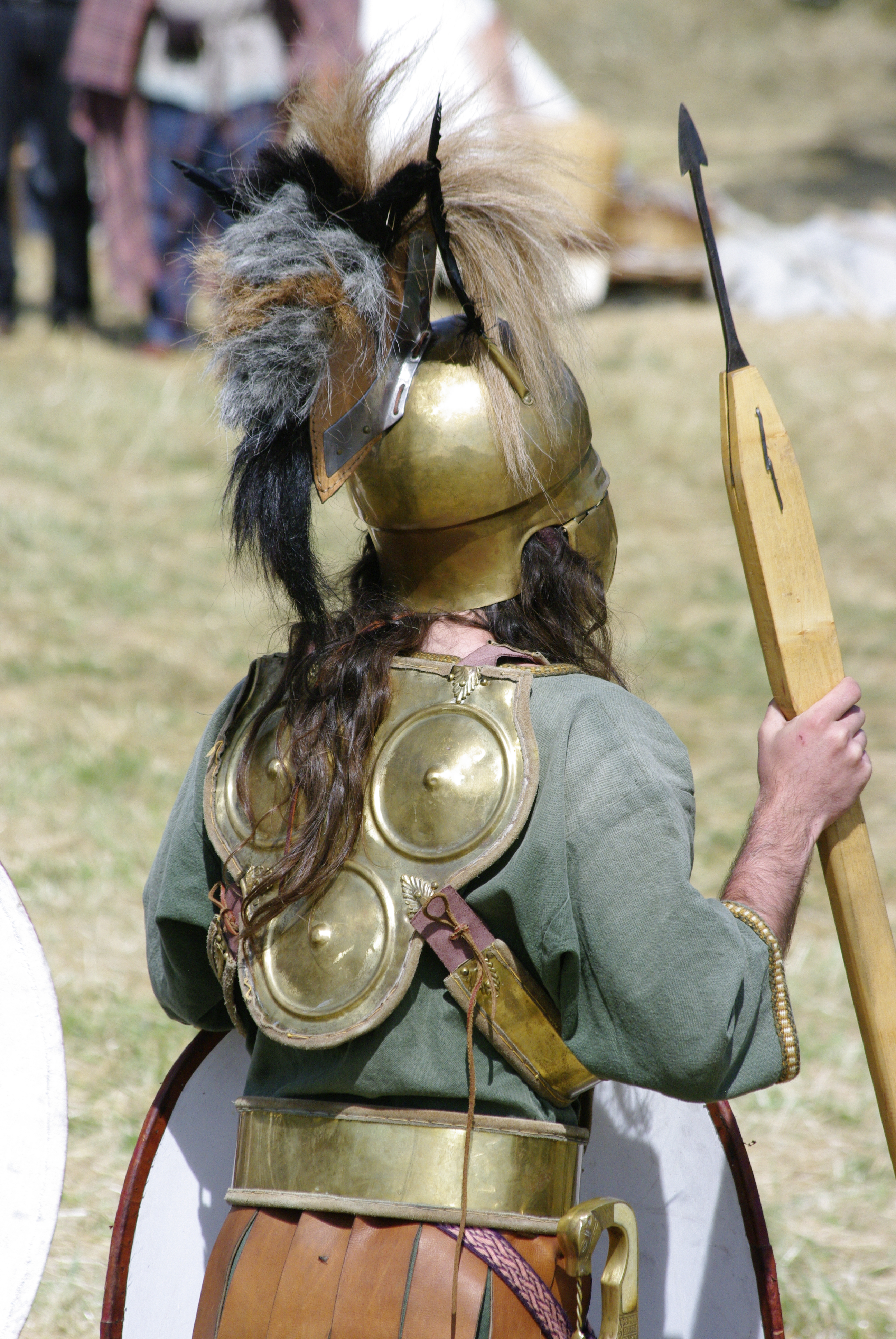 Soldat carthaginois portant un pectoral en bronze. Photographie réalisée le 22 juillet 2012 sur le plateau de Gergovie lors des Arverniales.